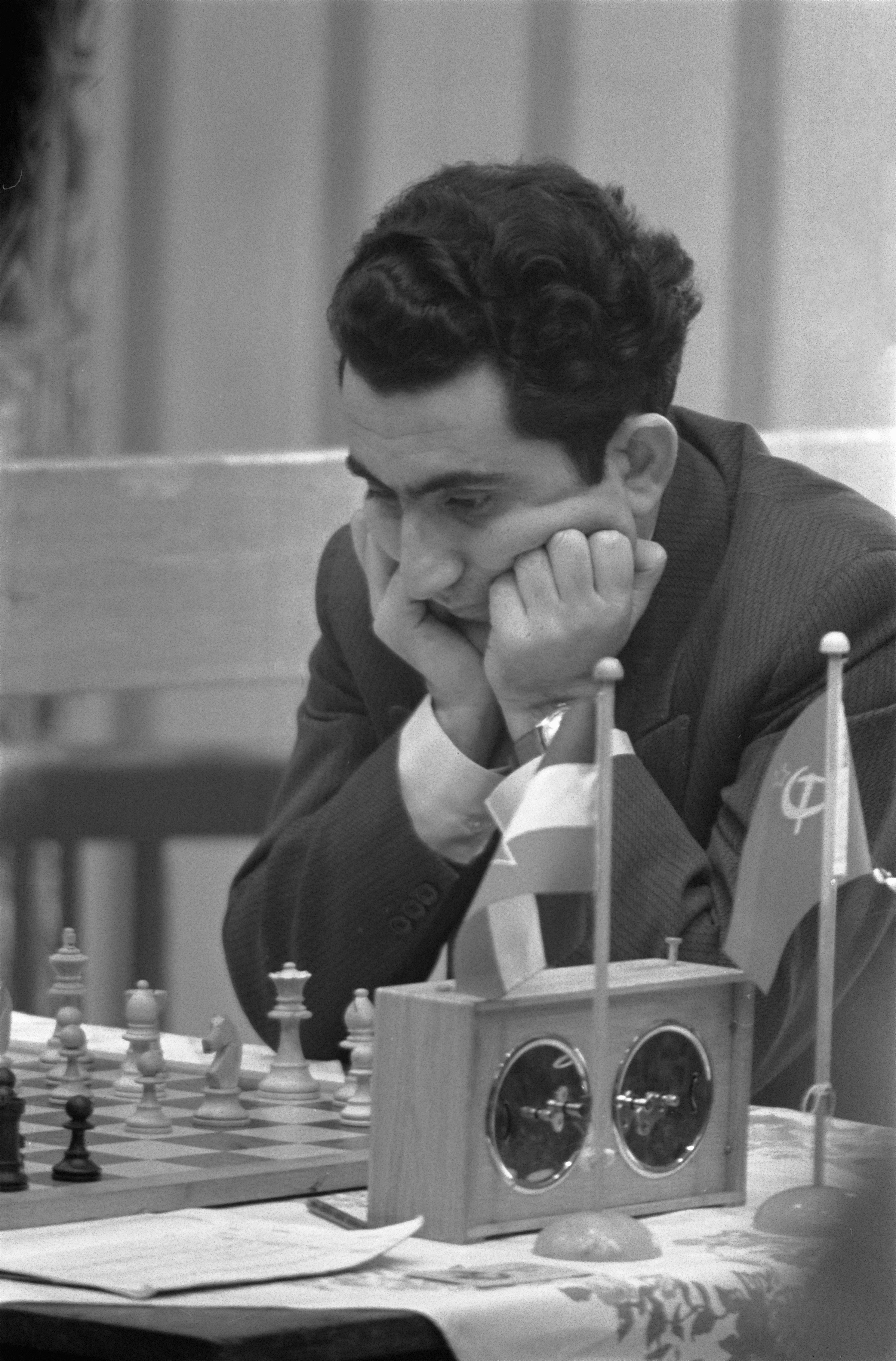 Hoogovenschaaktoernooi te Beverwijk, Petrosjan (Rusland) actie. Location: Beverwijk